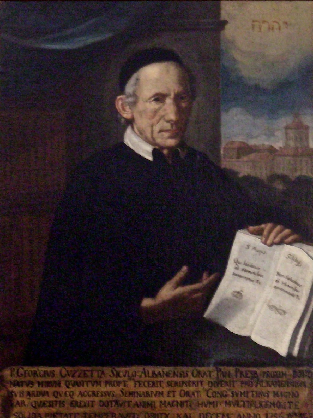 Ritratto, "P. Georgivs Gvzzetta Siculo Albanensis Orat [...]" P. Giorgio Guzzetta (1682 – 1756), Servo di Dio e Apostolo degli Albanesi di Sicilia, si prodigò nella difesa del rito orientale del suo popolo e avviò un profondo processo di rinnovamento spirituale e culturale, che fornì un sostegno decisivo alla salvaguardia e allo sviluppo del patrimonio degli arbëreshë. Fondatore e ideatore del primo e più antico centro d'albanologia, scopri il più antico testo in lingua albanese conosciuto, il Meshari di Gjon Buzuku, nel 1740. La sua personalità suscita l'interesse in ambito letterario, culturale e religioso ancora oggi. Dal 1934 è in corso la sua causa di beatificazione.